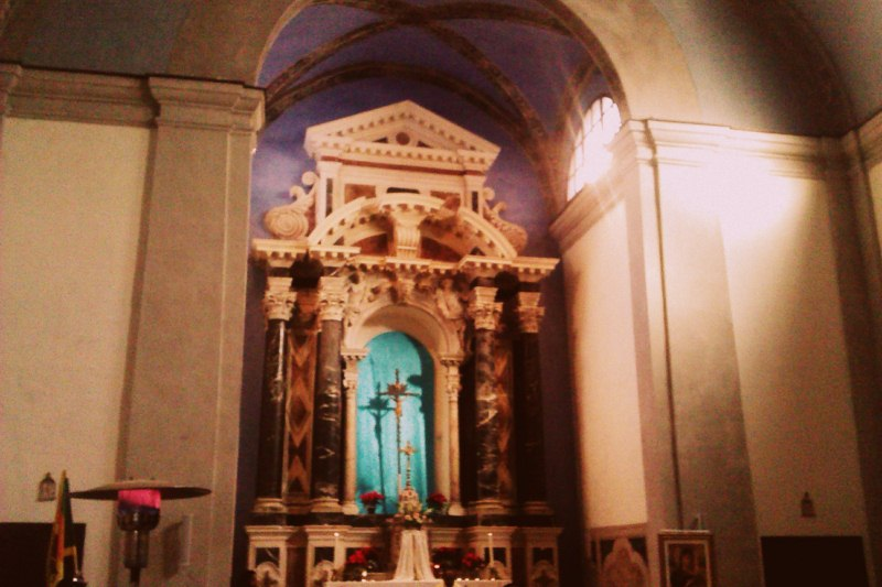 La chiesa di San Fermo a Padova